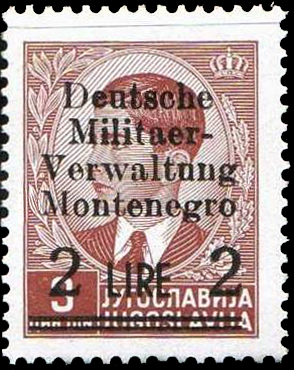 Почтовая марка Черногории под немецкой оккупацией. Надпечатка на марке Югославии 1939 года. Stamp of Montenegro under German occupation.